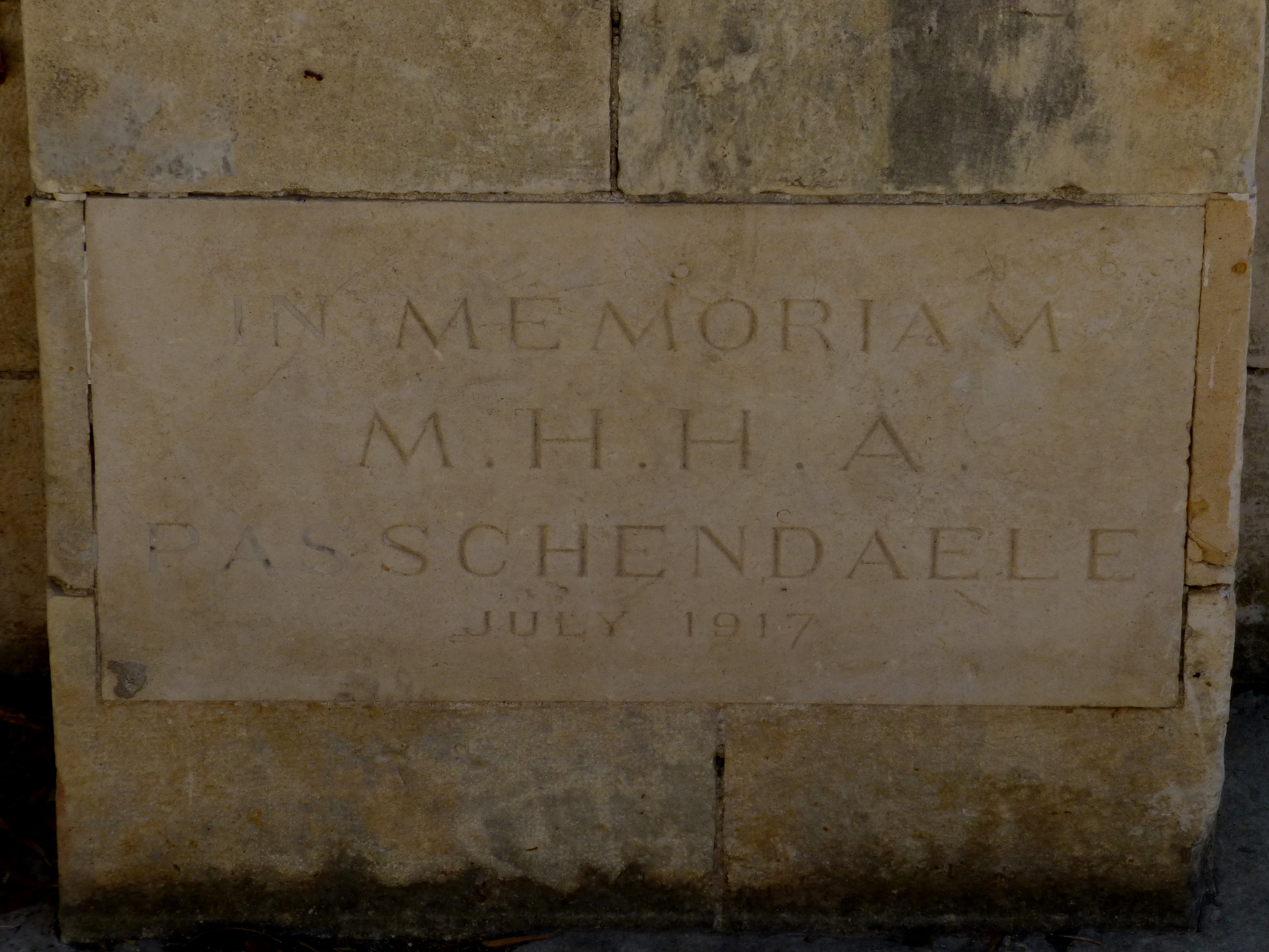 גן אלנבי - רח' יפה נוף 120, מרכז הכרמל, חיפה. שלט לזכרו של מייקל אלנבי, בנו של אדמונד אלנבי